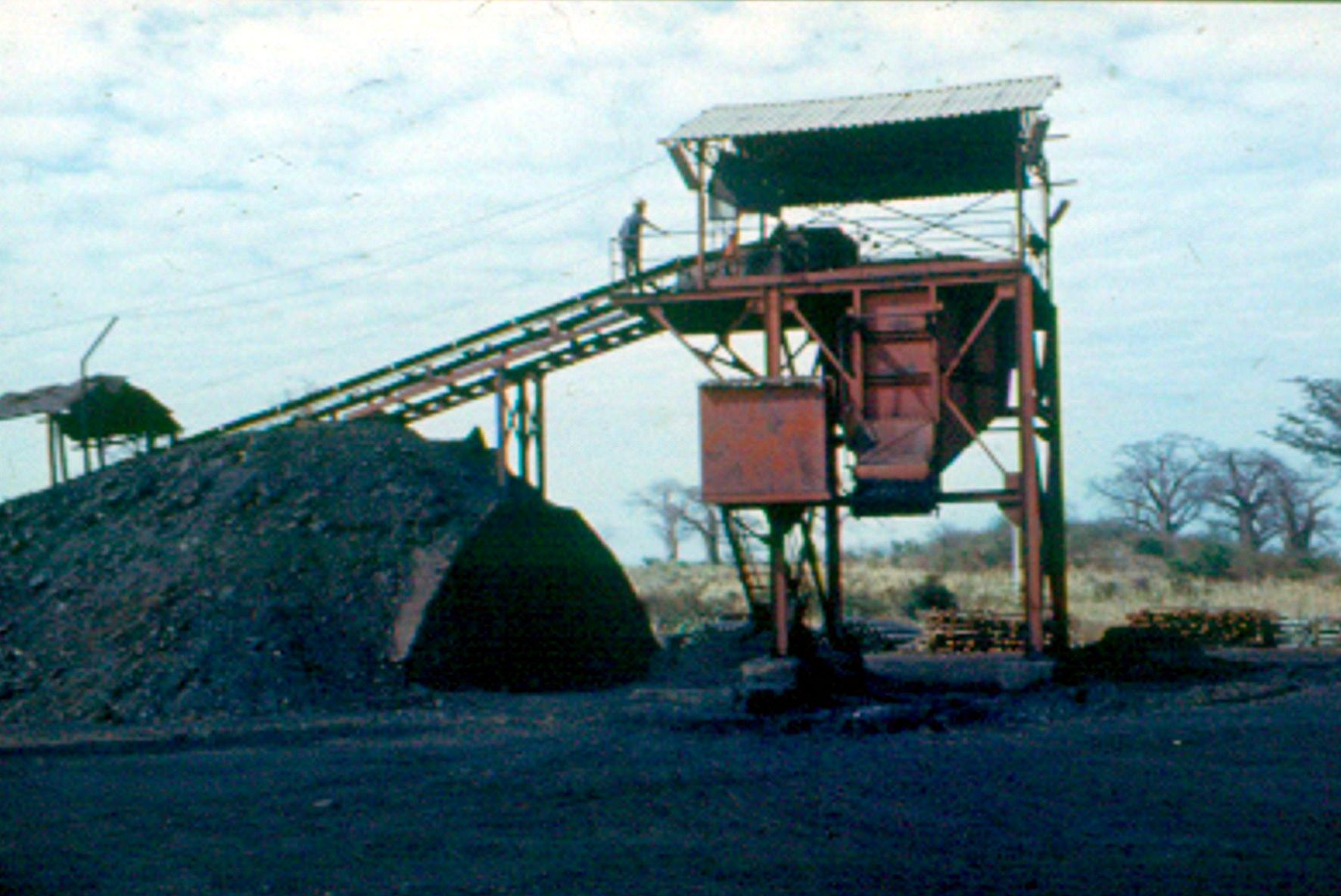 Moçambique, Moatize, CARBOMOC, Kohle-Förderanlage, 1982